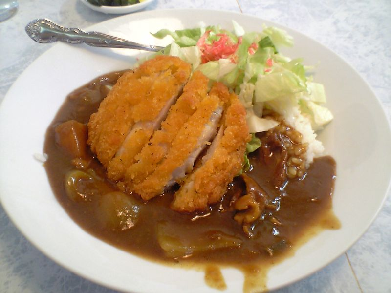 利休＠鎌倉